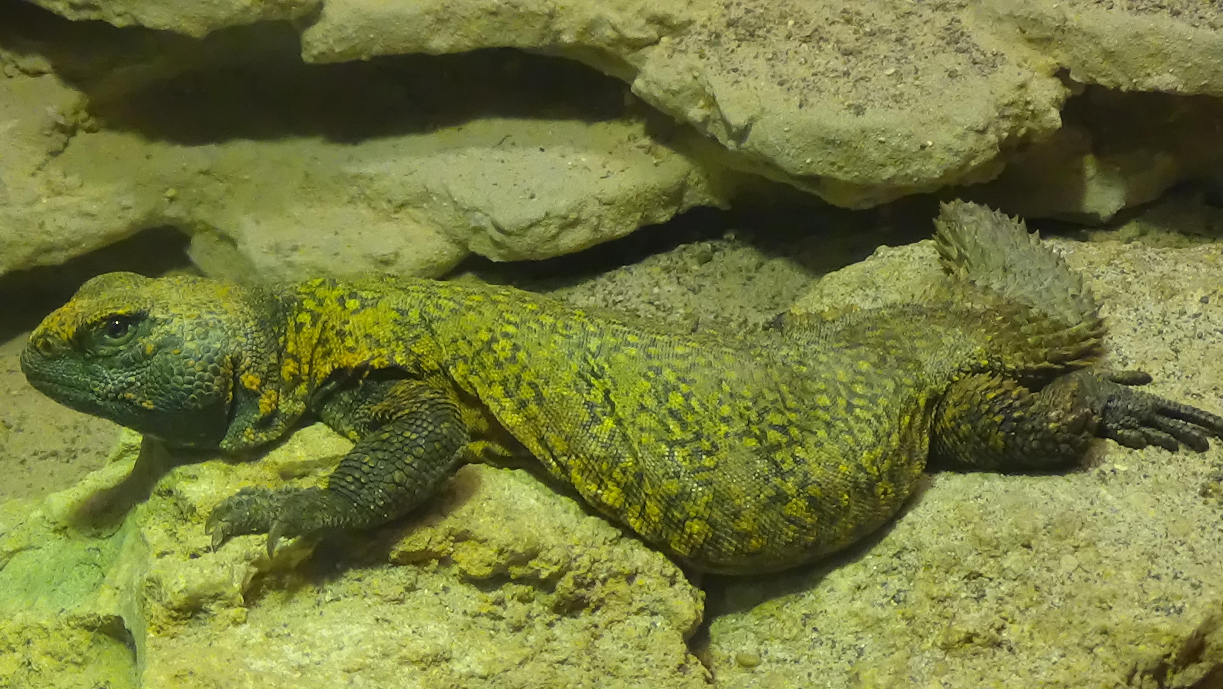 Uromastyx nigriventris - spécimen adulte - Uromastyx acanthinurus nigriventris - Ménagerie du jardin des plantes de Paris, Ile de France, France - 11/2014